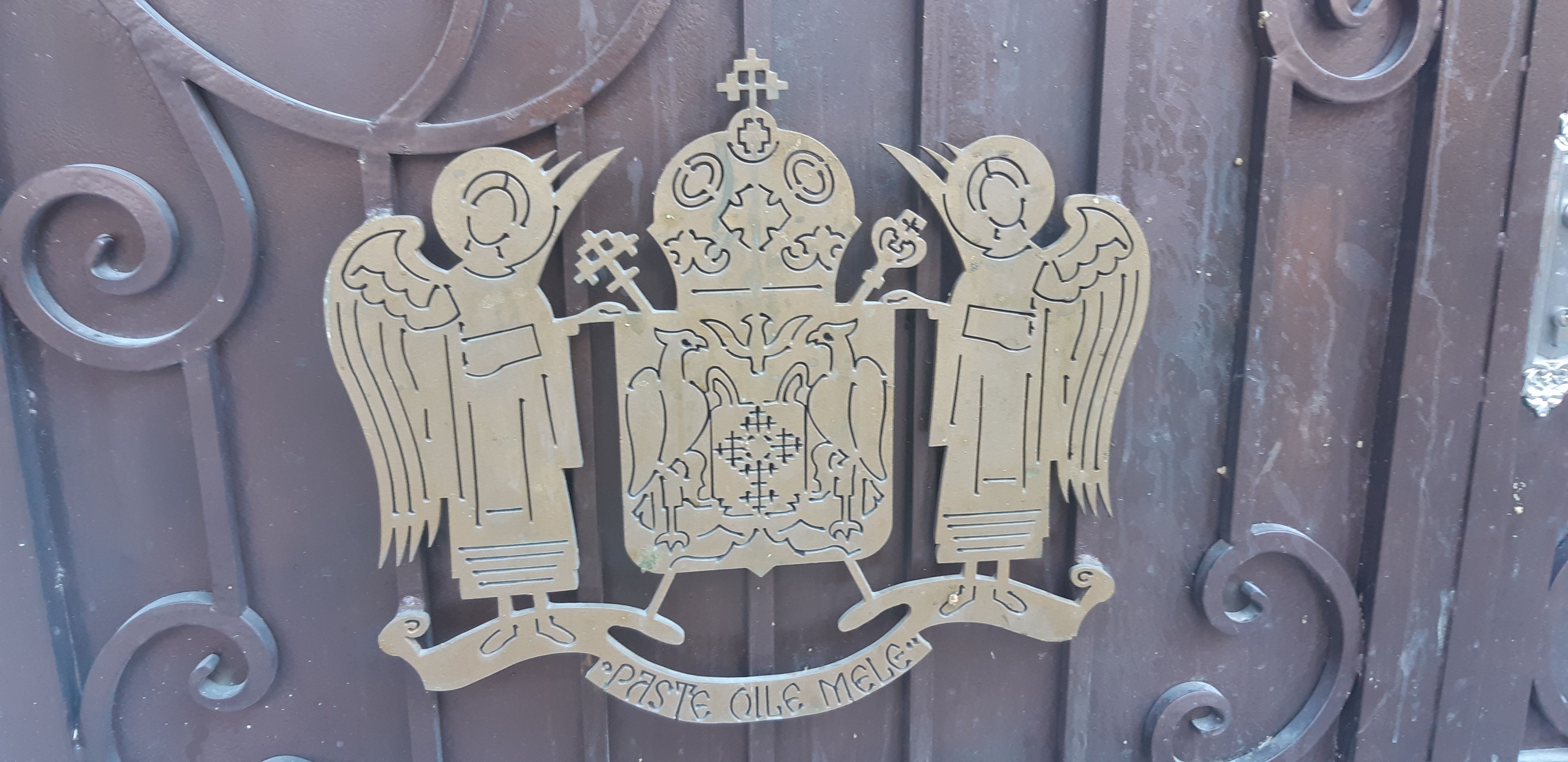 סמל הכנסיה הרומנית בירושלים